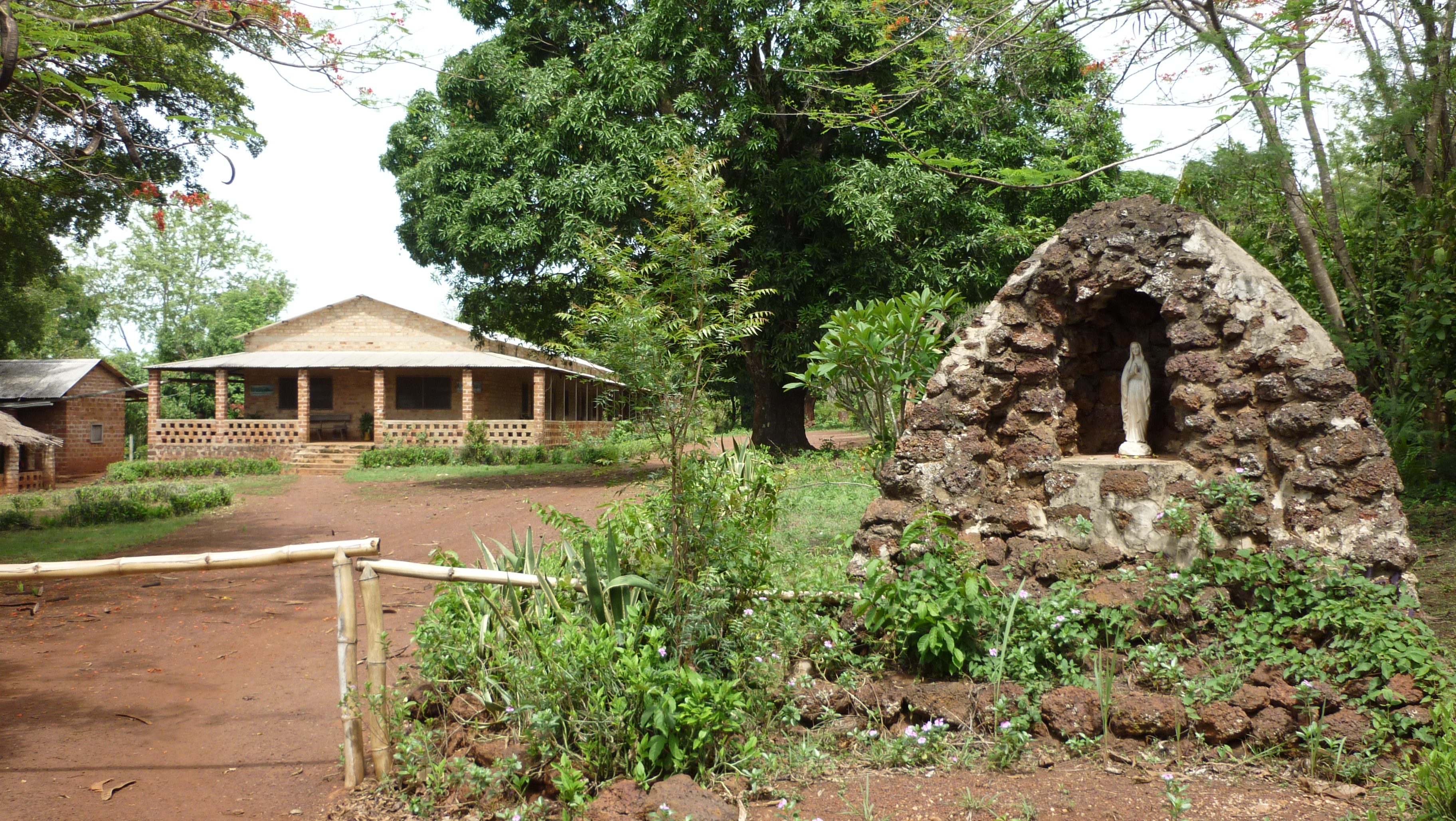 Misión católica de Obo (República Centroafricana)